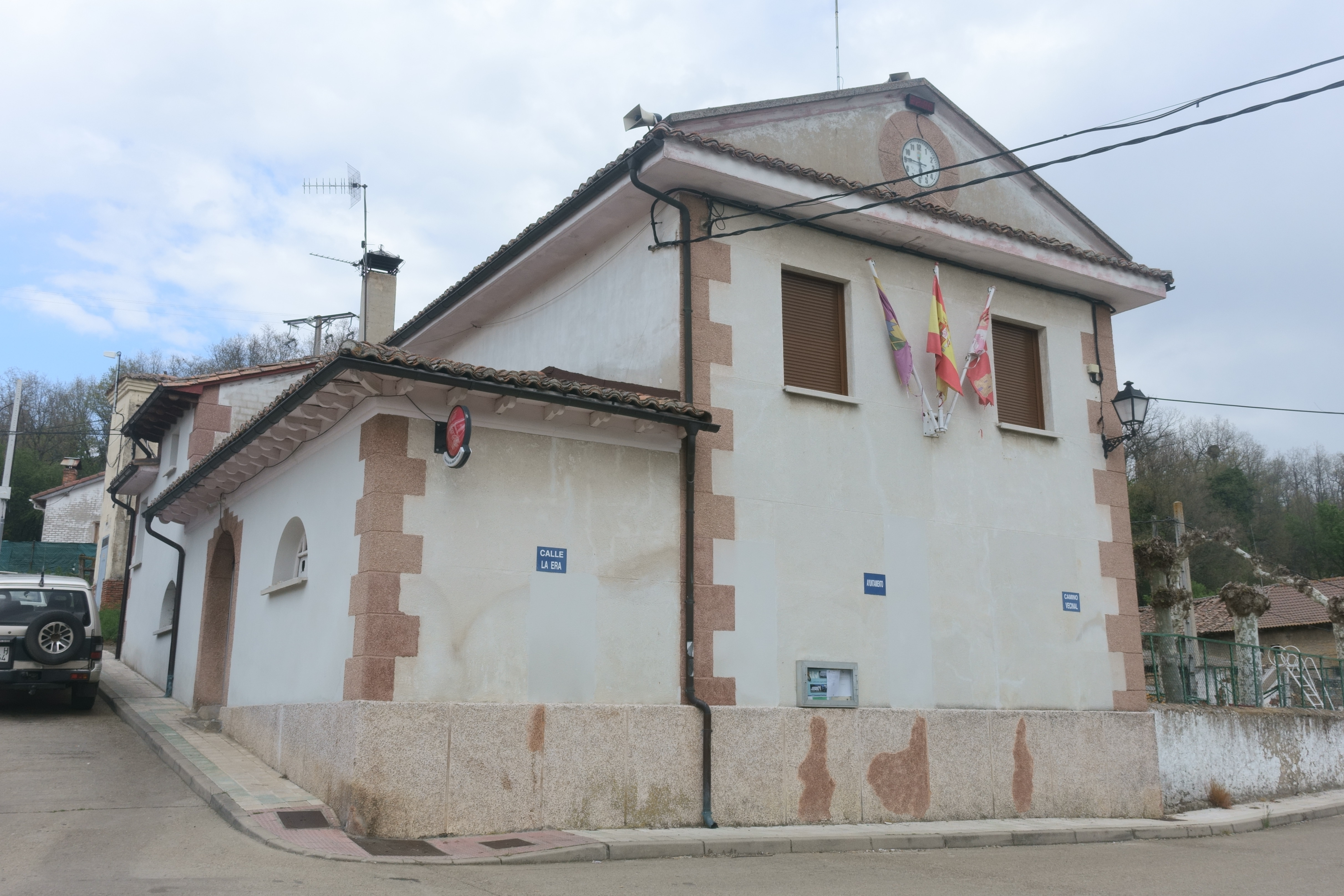 Casa consistorial de Mantinos (Palencia, España).